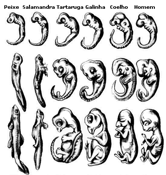 Desenvolvimento embrionário de vertebrados segundo Haeckel. A primeira fileira corresponde aos estágios iniciais de desenvolvimento; a segunda corresponde aos estágios intermediários e a terceira, aos estágios finais (Modificado de Gilbert, 1997)